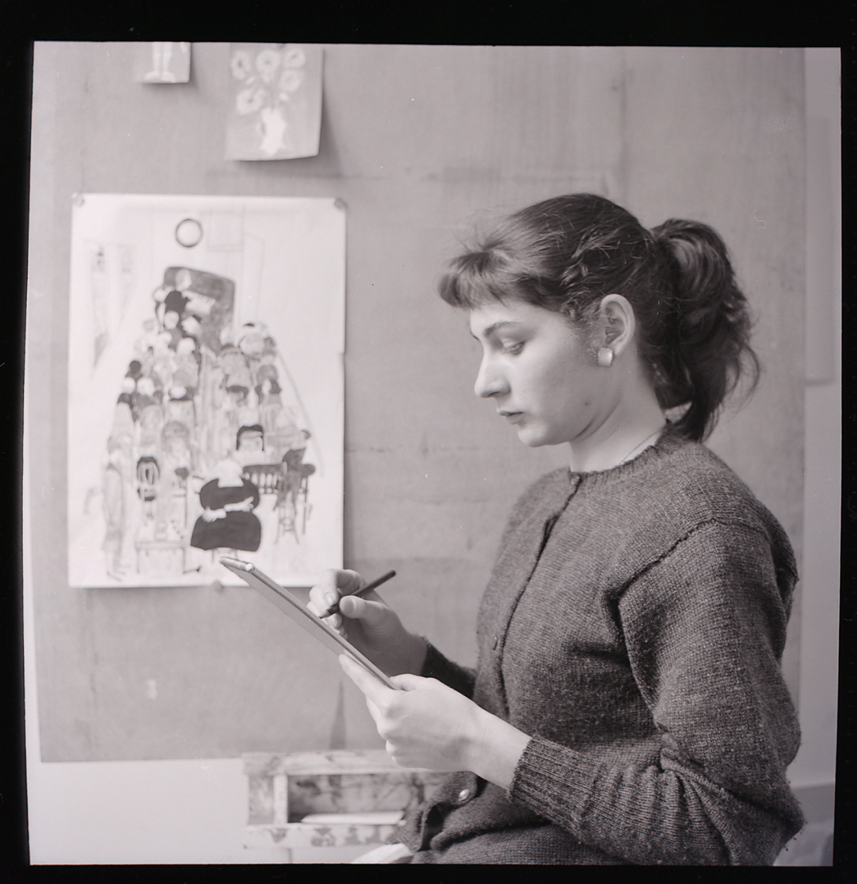 Servizio fotografico : Milano, 1958 / Paolo Monti. - Buste: 10, Fototipi: 10 : Negativo b/n, gelatina bromuro d'argento/ pellicola ; 6x6. - ((Serie costituita da 10 buste di negativi identificati con i nn.: 4774, 4775, 4776, 4777, 4778, 4779, 4780, 4781, 4782, 4783, e tenute insieme da una graffetta. - Sulla busta identificata con il n. 4774 iscrizione didascalica manoscritta a pennarello: "Bianconi". - La donna ritratta è presumibilmente la moglie di Fulvio Bianconi, grafico e designer.